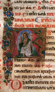 vrbnički misal II